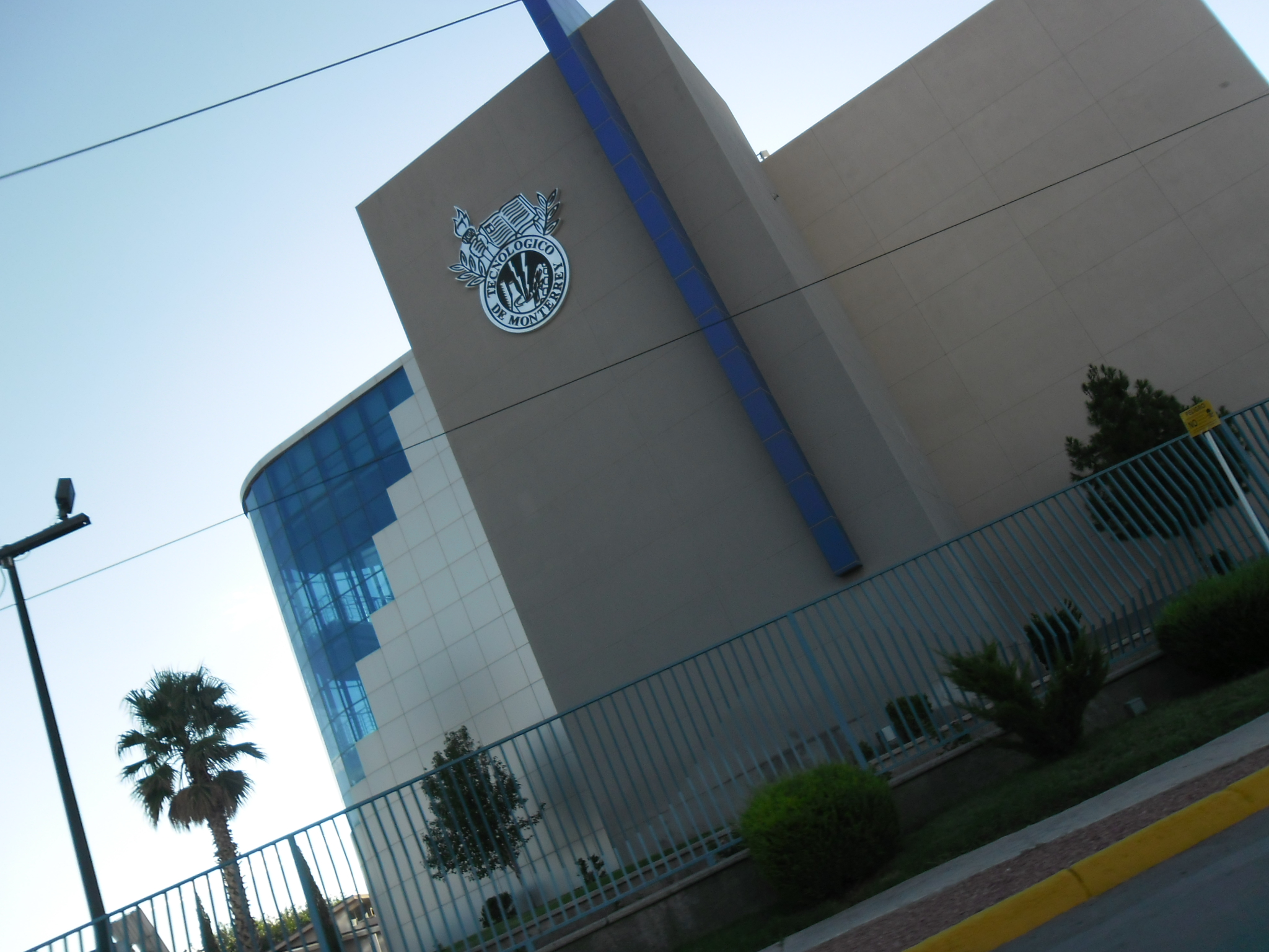 ITESM